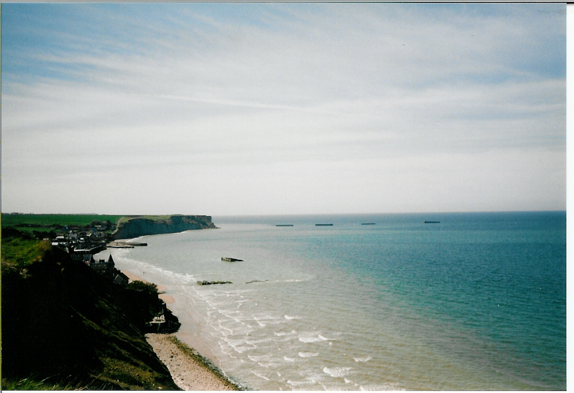 Hier zie je de overblijfselen van de Mulberry bij Arromanches.